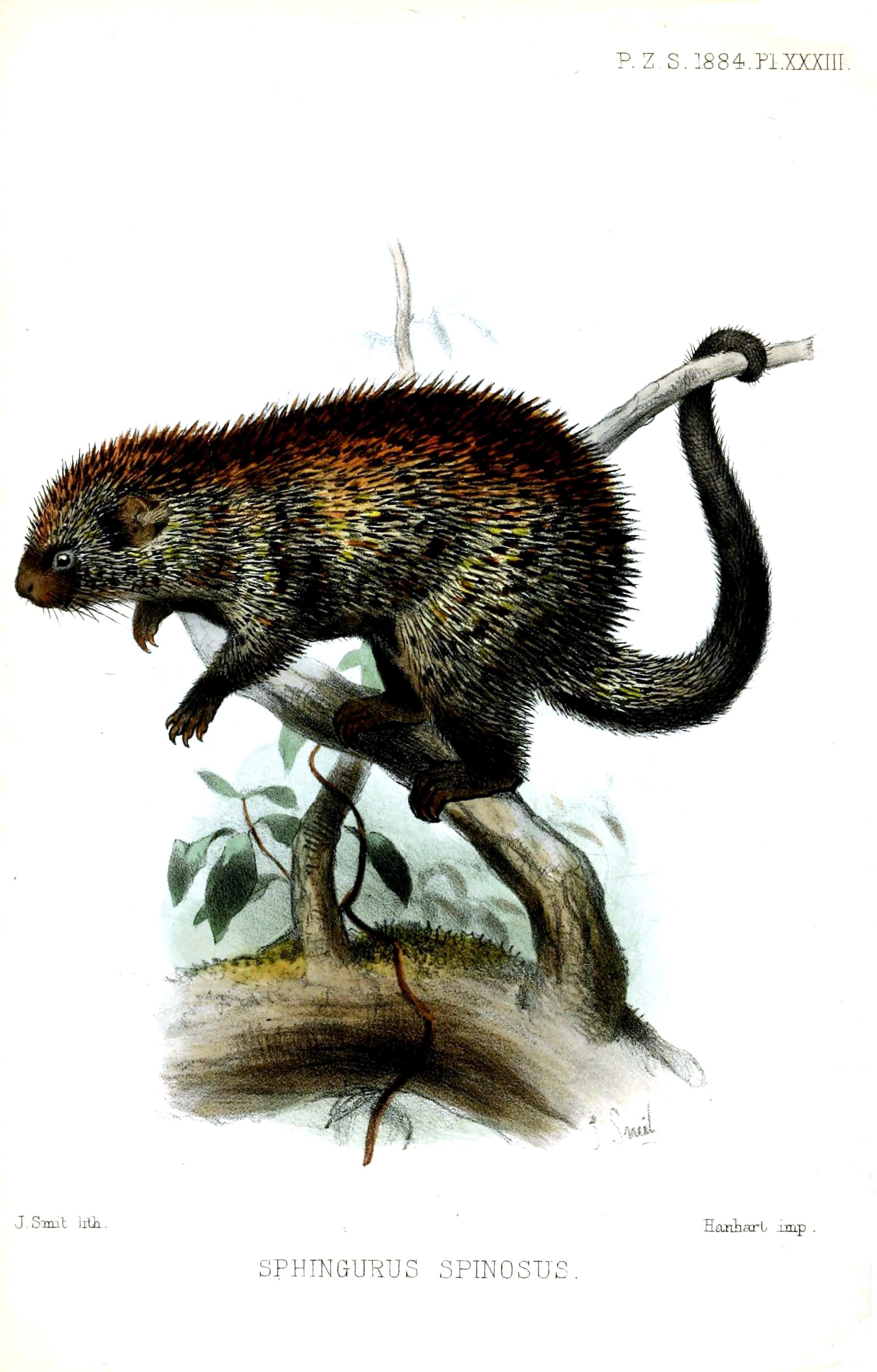 Sphingurus spinosus = Sphiggurus spinosus